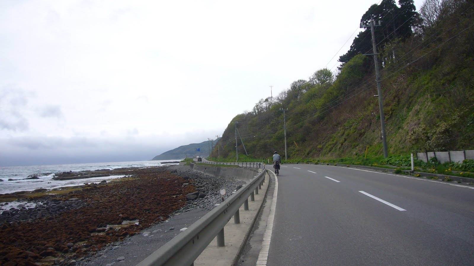 はまなすライン